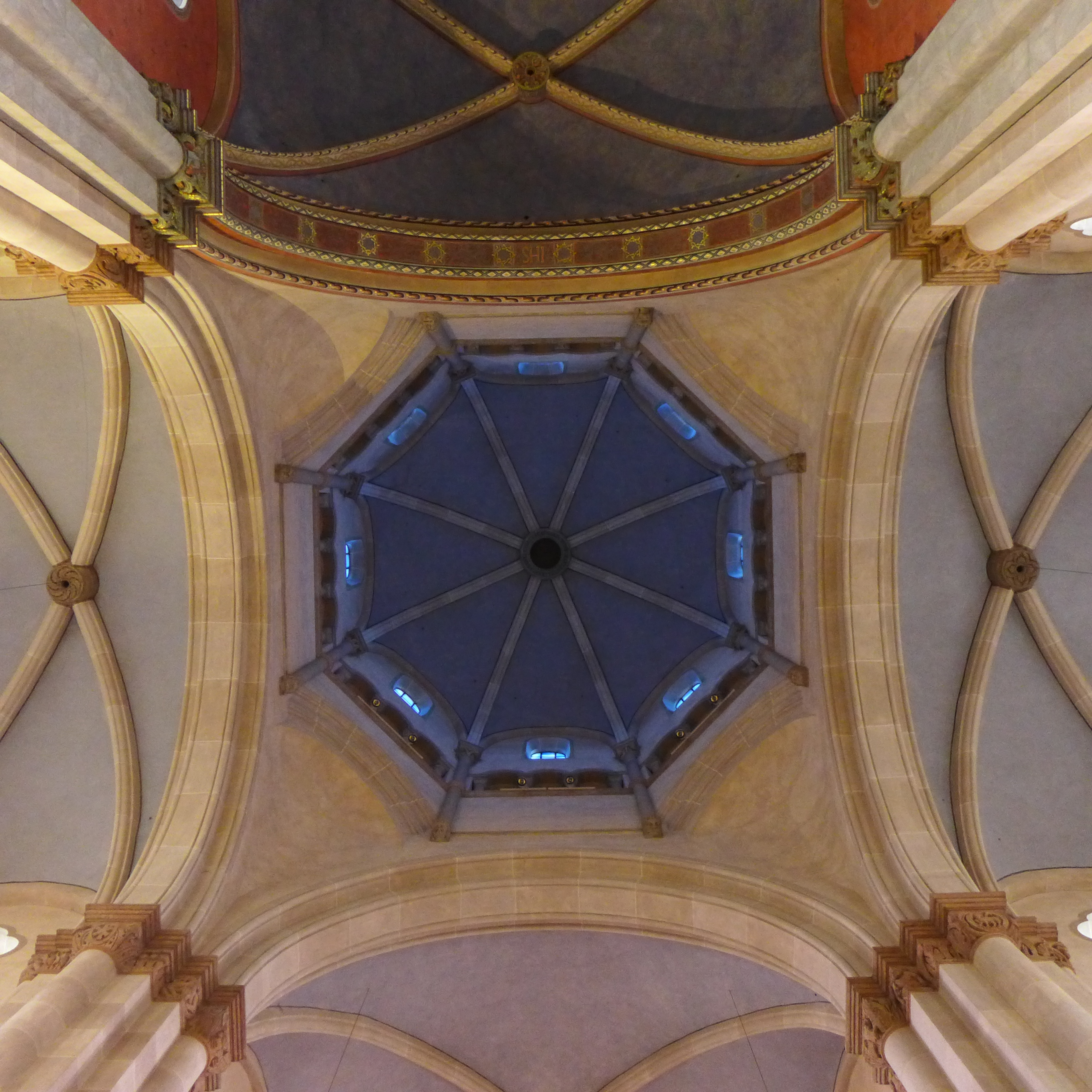 St. Benno (München), Blick in die Kuppel